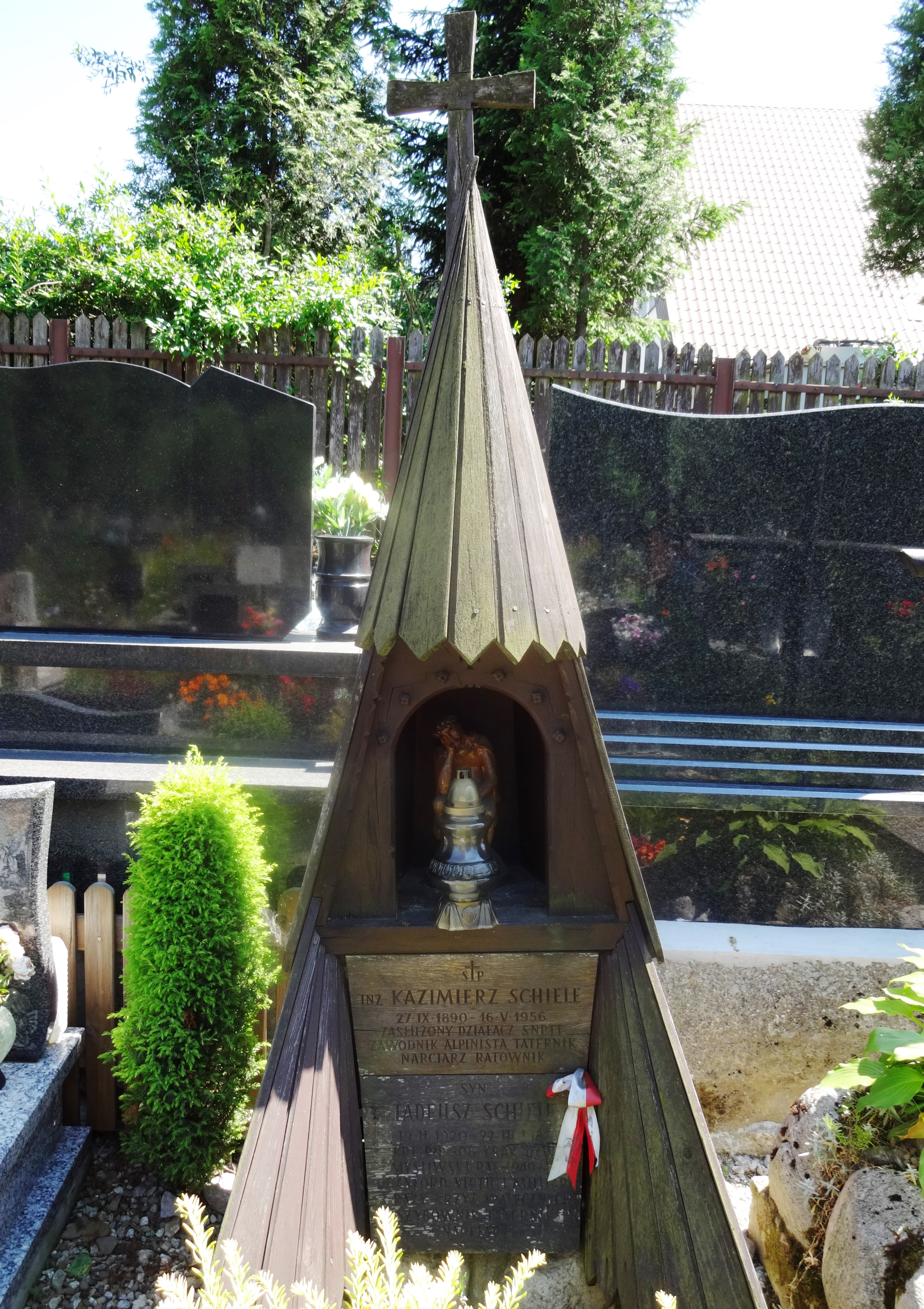 New Cemetery in Zakopane